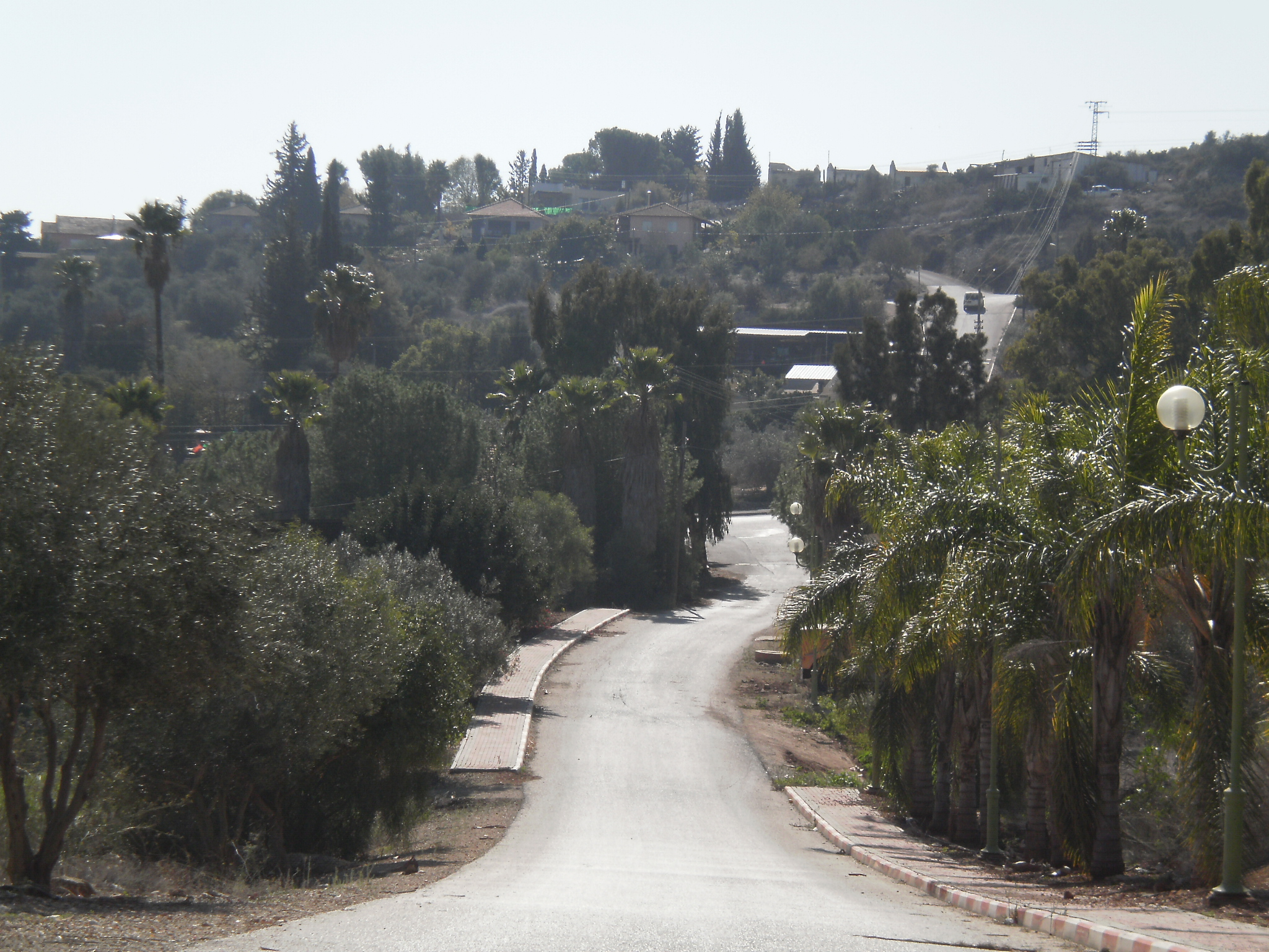 Moshav Ilaniya, Israel מושב אילניה, ישראל